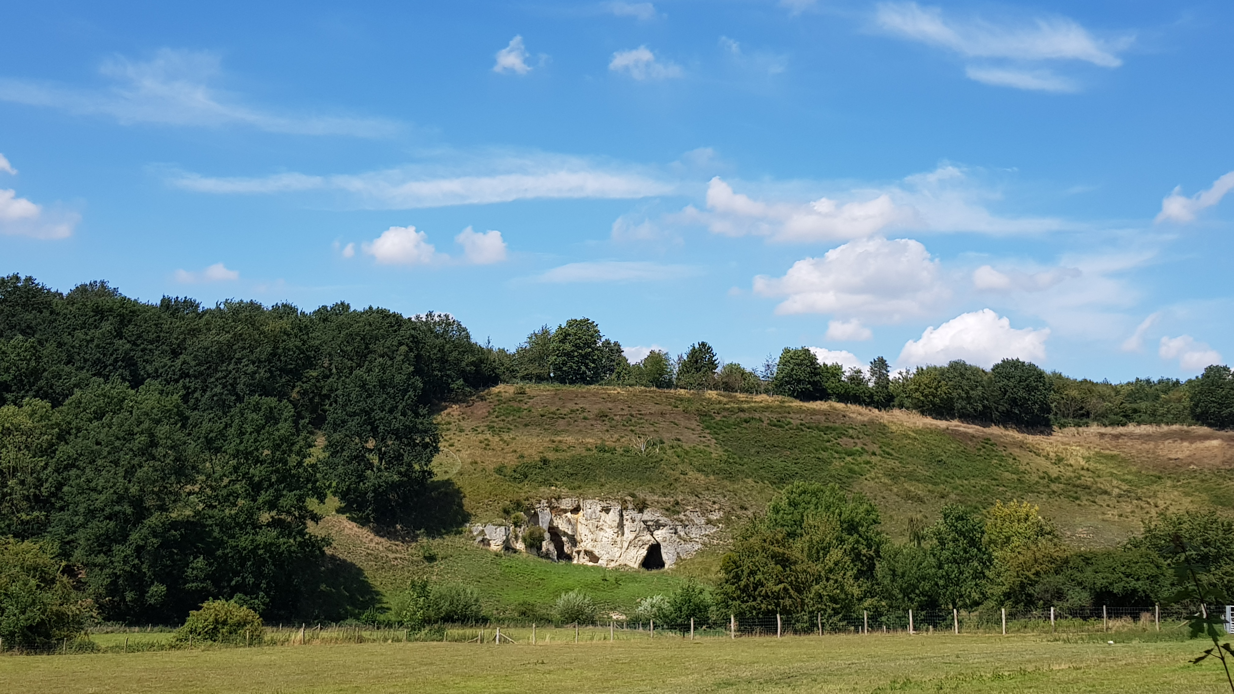 Winkelberggroeve bij Bemelen, Nederland